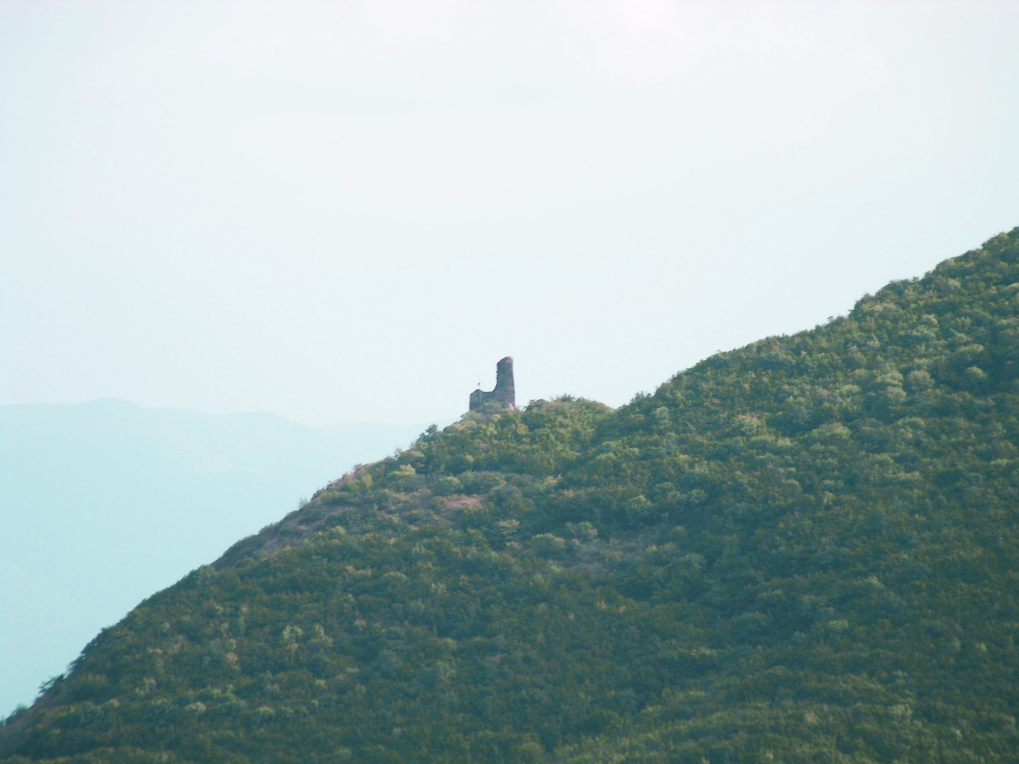 კლდემაღალას ციხე